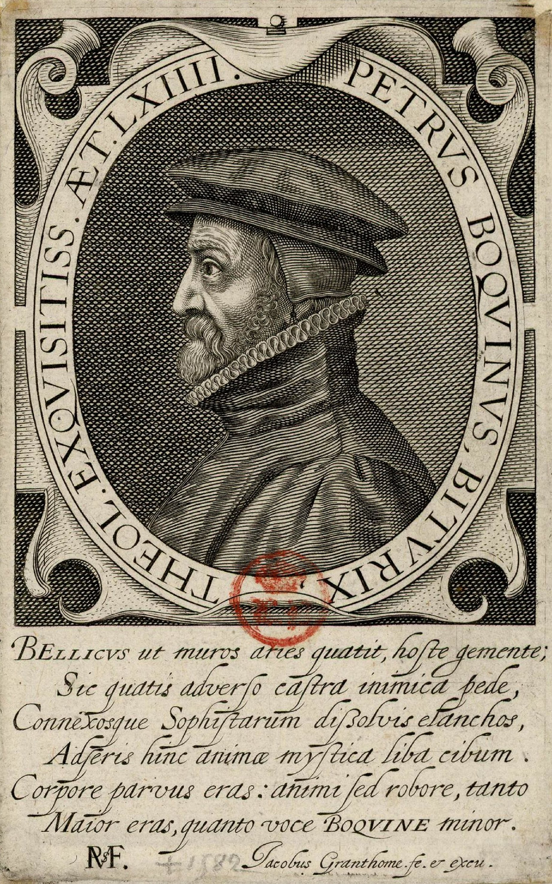 Stich mit dem Porträt des französischen Theologen Pierre Buoquin